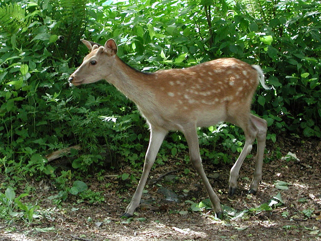 エゾジカ (北海道阿寒湖畔で撮影) C.n.yesoensis (Akan Lake, Hokkaido, JAPAN)